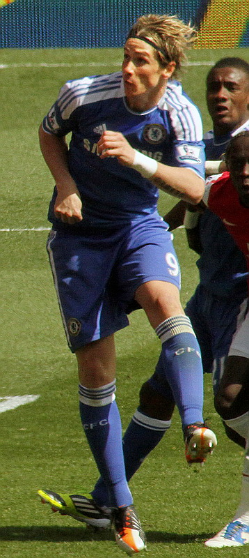 Fernando Torres